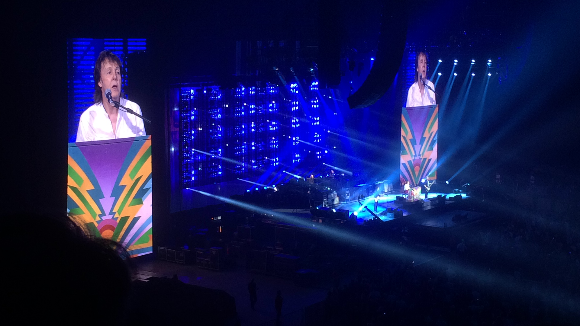 Paul McCartney - Tele2 Arena - Stockholm - 9 Juli 2015 - Konsert - out there